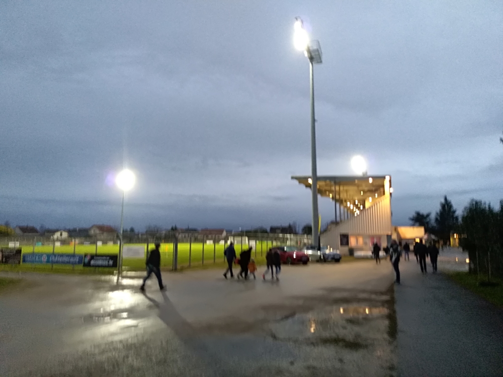 Soir de match au stade de la Montée Rouge le 29 février 2020 avant la rencontre SO Châtellerault - Stade Poitevin FC